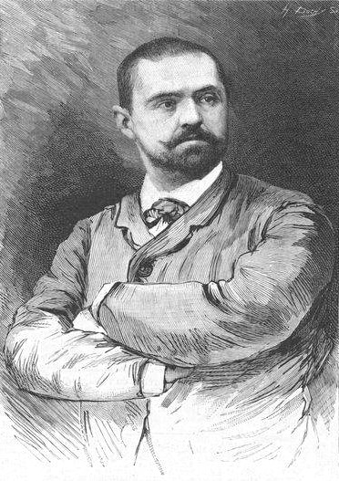 "M. Antoine Léandri, publiciste corse, acquitté le 1er août, par la cour d'assises de Bastia. (Phot. O. Santoni. Ajaccio)".